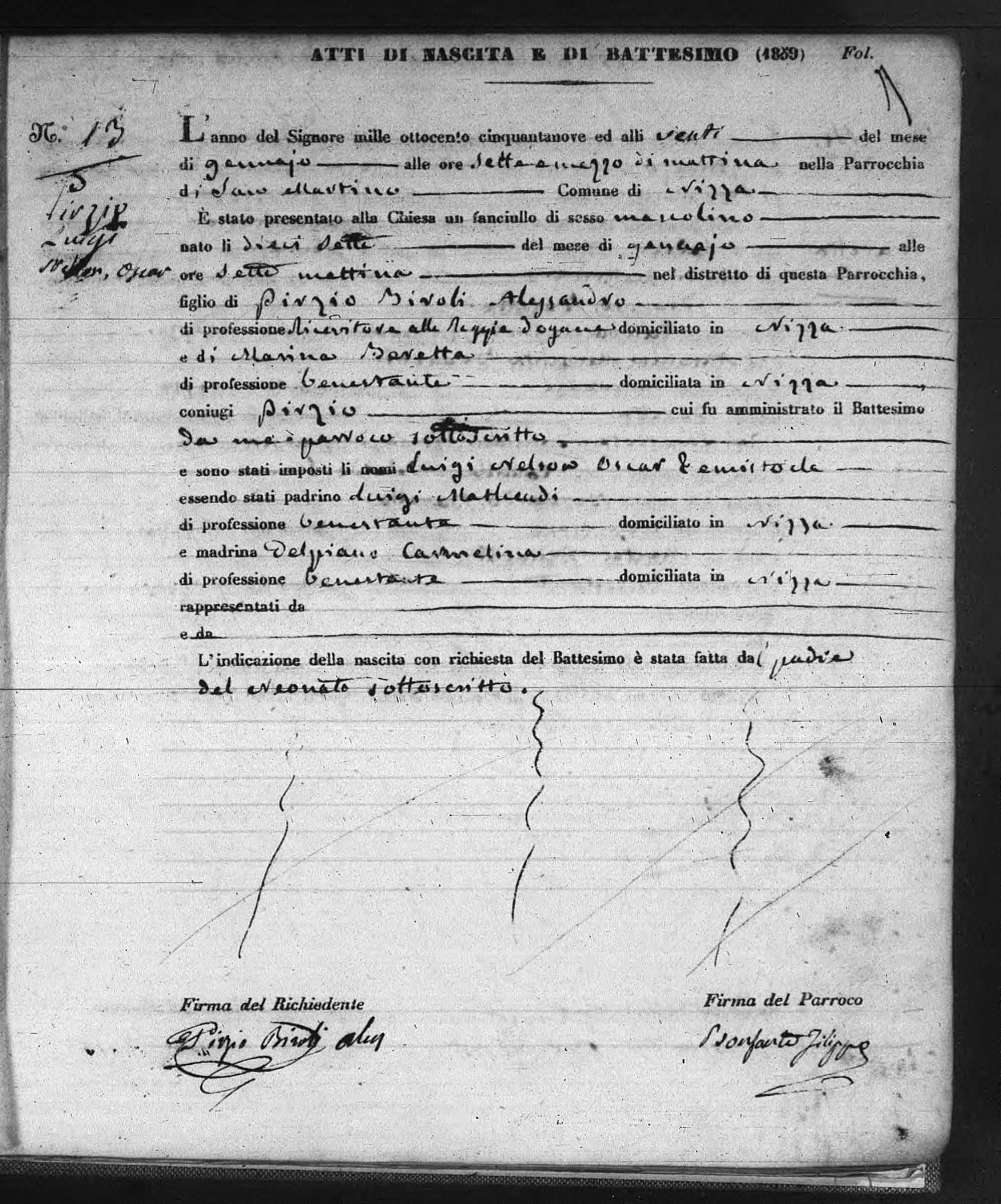 certificato di nacita bautismo